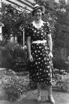 Cornelia de Vogel op bezoek bij familie in Haarlem